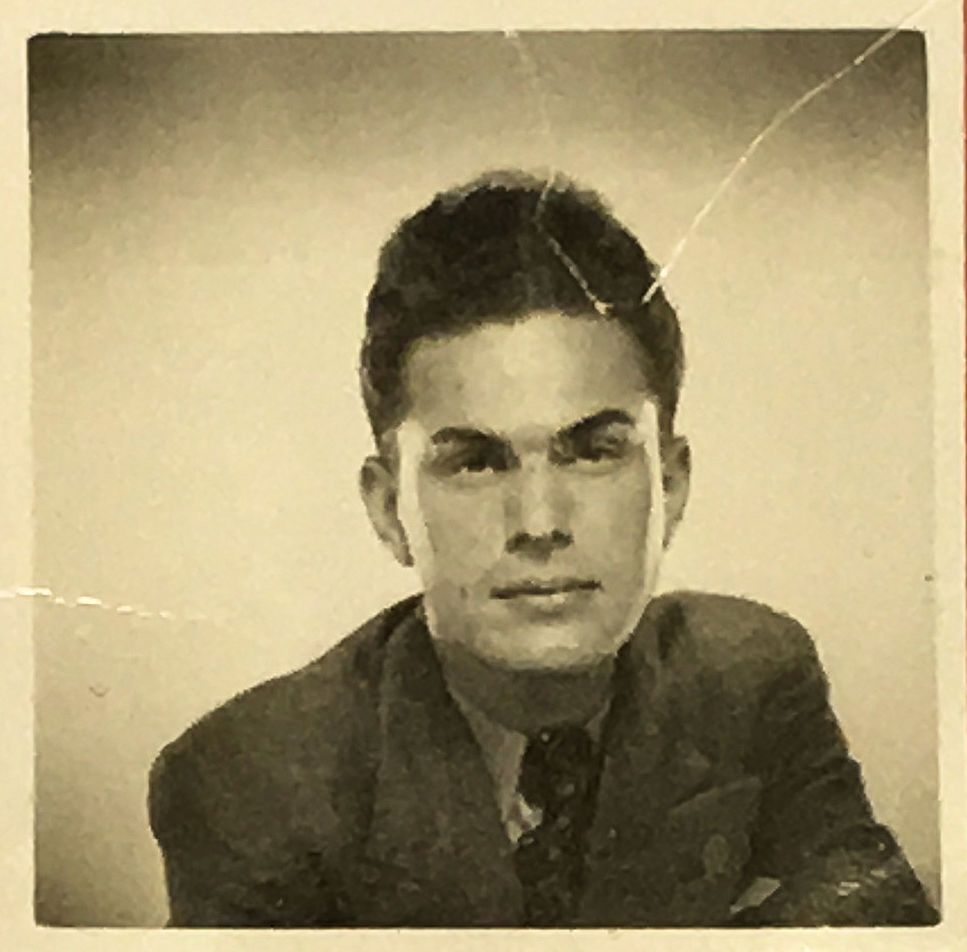 1-2 Wochen vor seinem Tode schenkte Horst-Siegfried Weigmann dieses Passfoto seiner Arbeitskollegin/Bekannten Frau Meissner aus Radebeul.